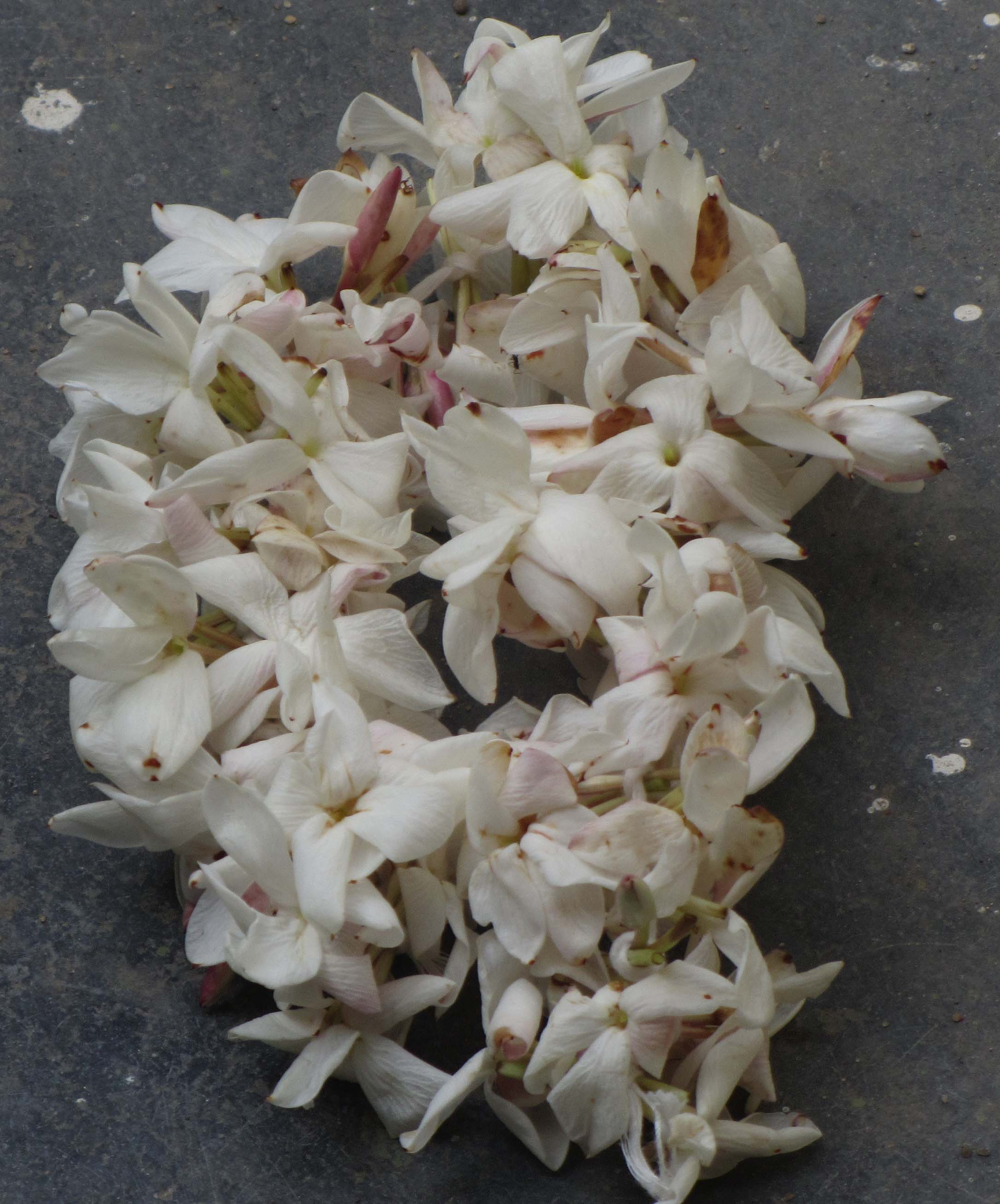 own shot தளவம் எனக் கூறப்படும் செம்முல்லை இது. இக்காலப் பூக்காரி இதனைச் சாதிமல்லி என்கிறார்.